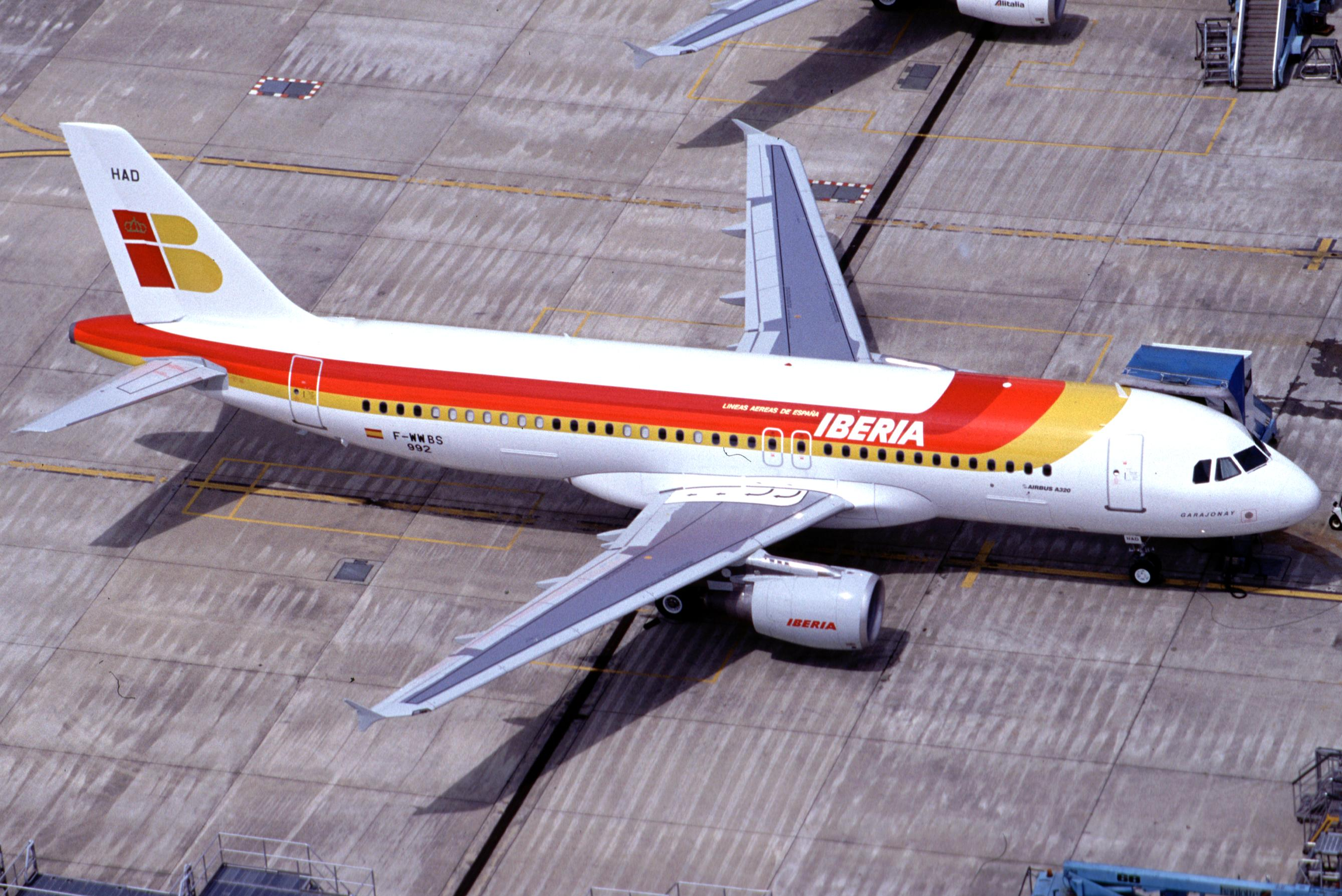 EC_HAD